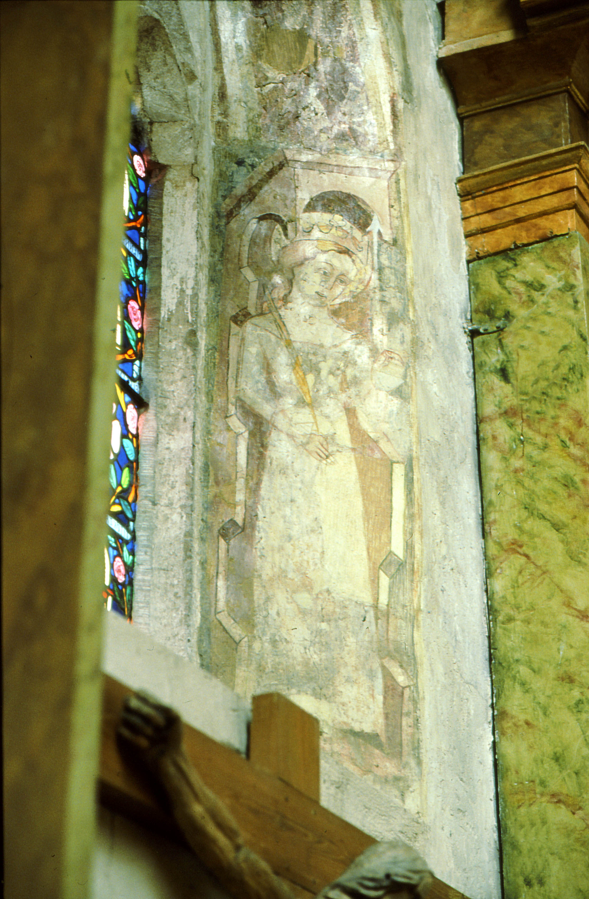 A tereskei római katolikus templom oltára középkori falfreskóval (Nógrád megye, Magyarország)